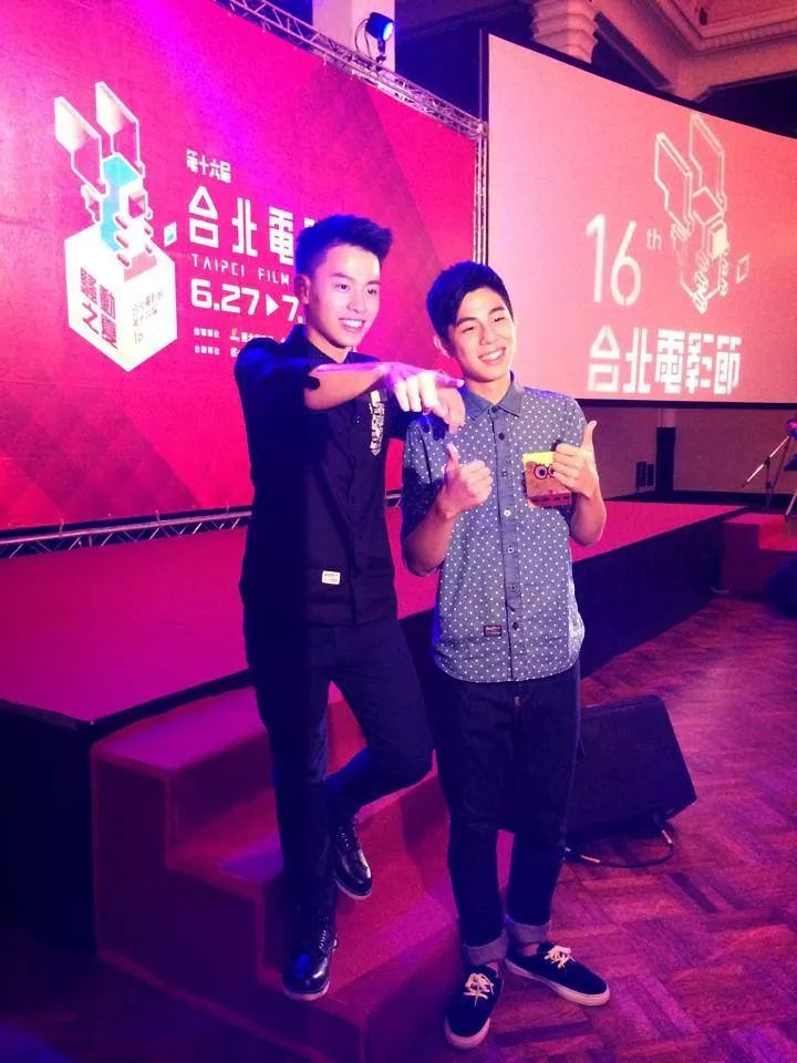 第16屆臺北電影節，魏漢鼎（左）與詹懷雲（右）。